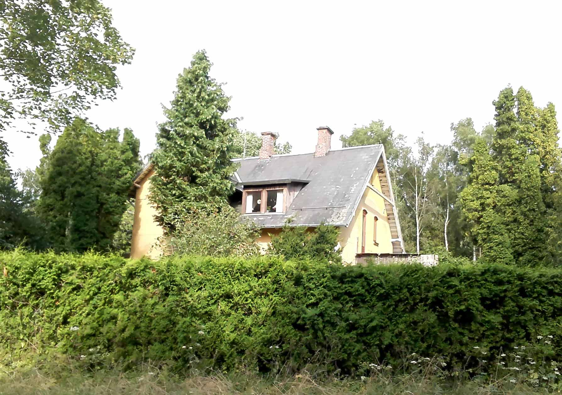 Rygård Station i Langå (Nyborg Kommune) fra vest